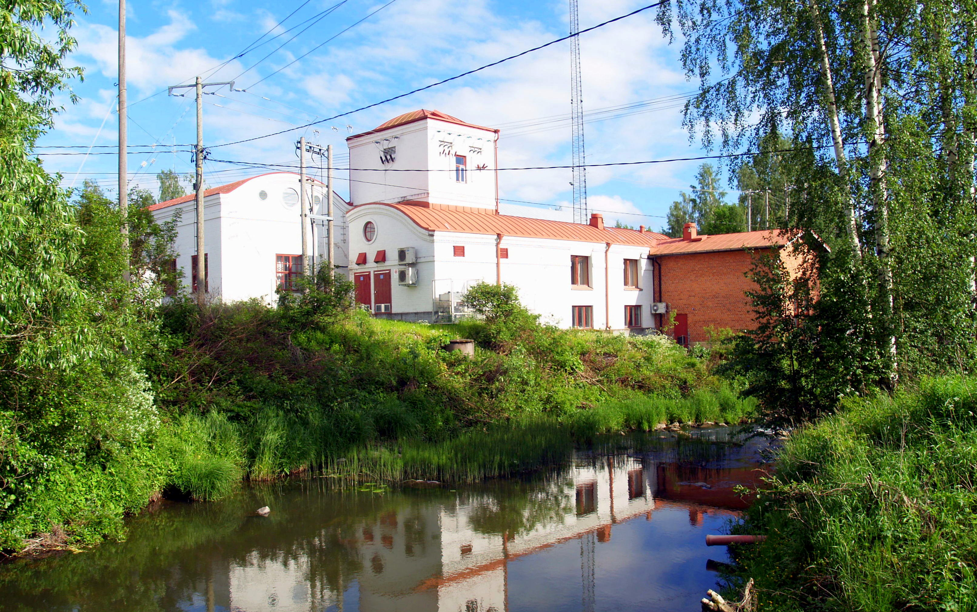 Paneliankosken voimalaitos, Panelia, Eurajoki This is a photo of a monument in Finland identified by the ID 'Paneliankoski Power Plant' (Q18682390) Original photo is: Paneliankosken Voimalaitos